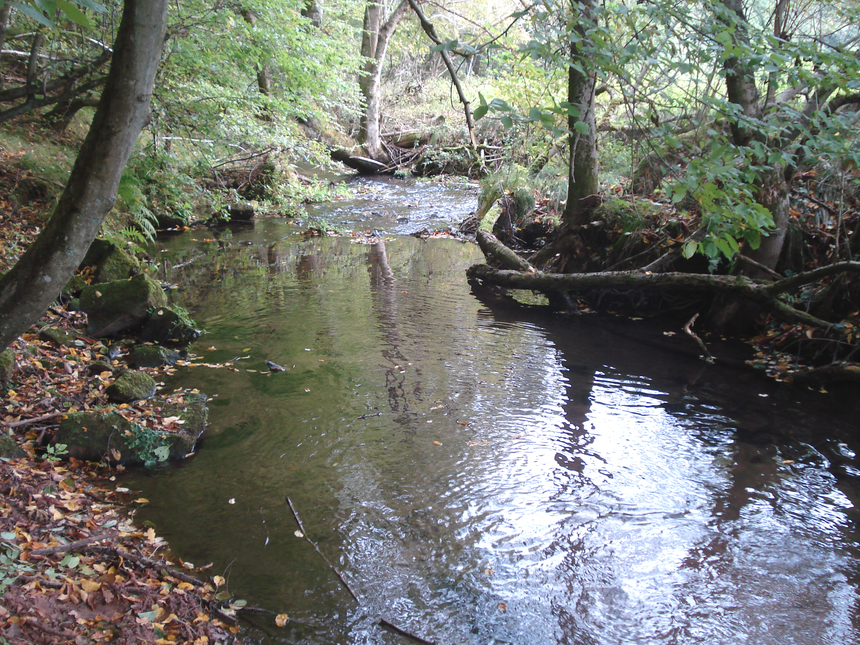 Der Gabelbach nach dem Zusammenfluss seiner Quellbäche